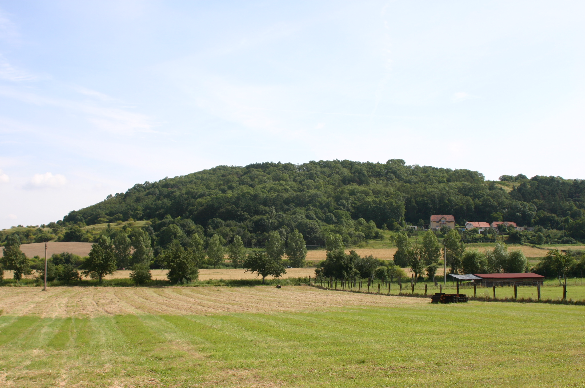 Jánský vrch u obce Korozluky v okrese Most